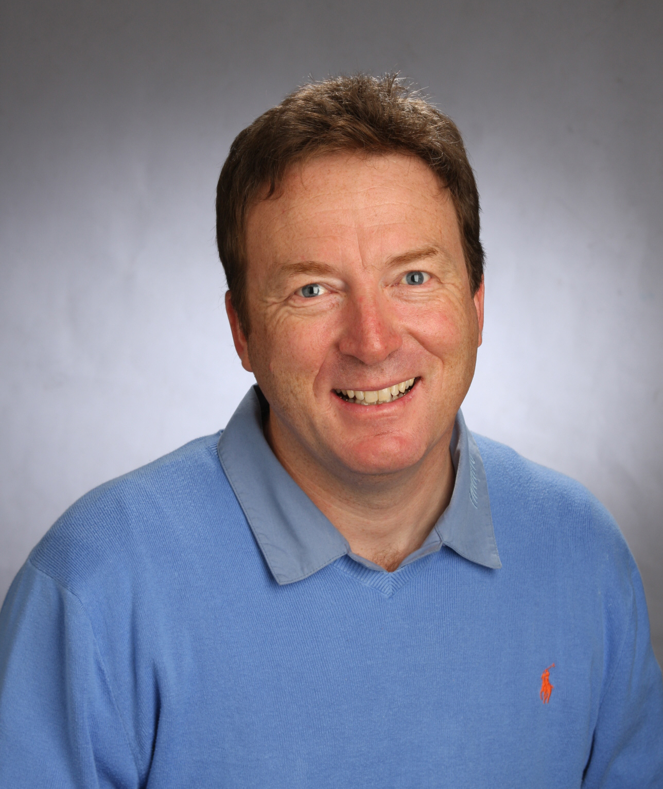 Gundolf Frithjof Thoma, ehemaliger Skirennläufer und Profiskifahrer